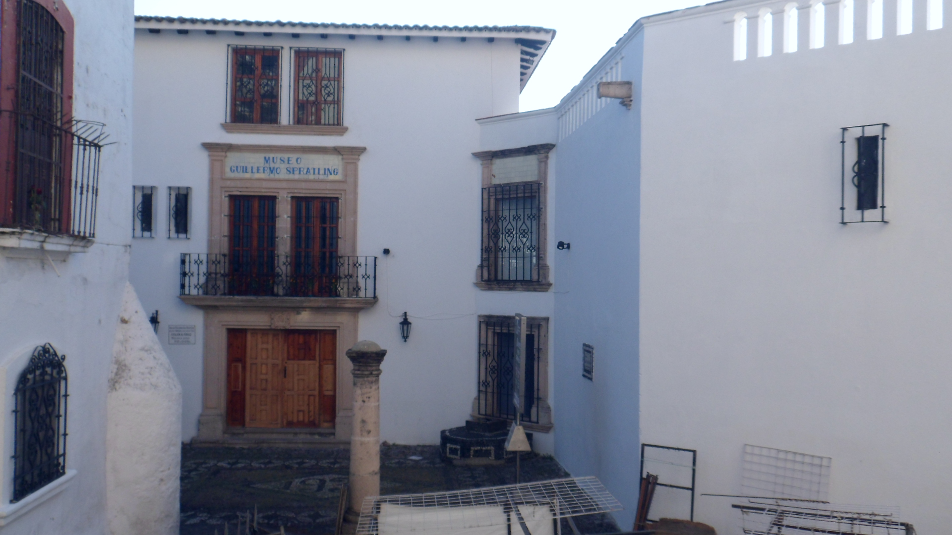 Museo Guillermo Spratling, Taxco de Alarcon, Guerrero, México